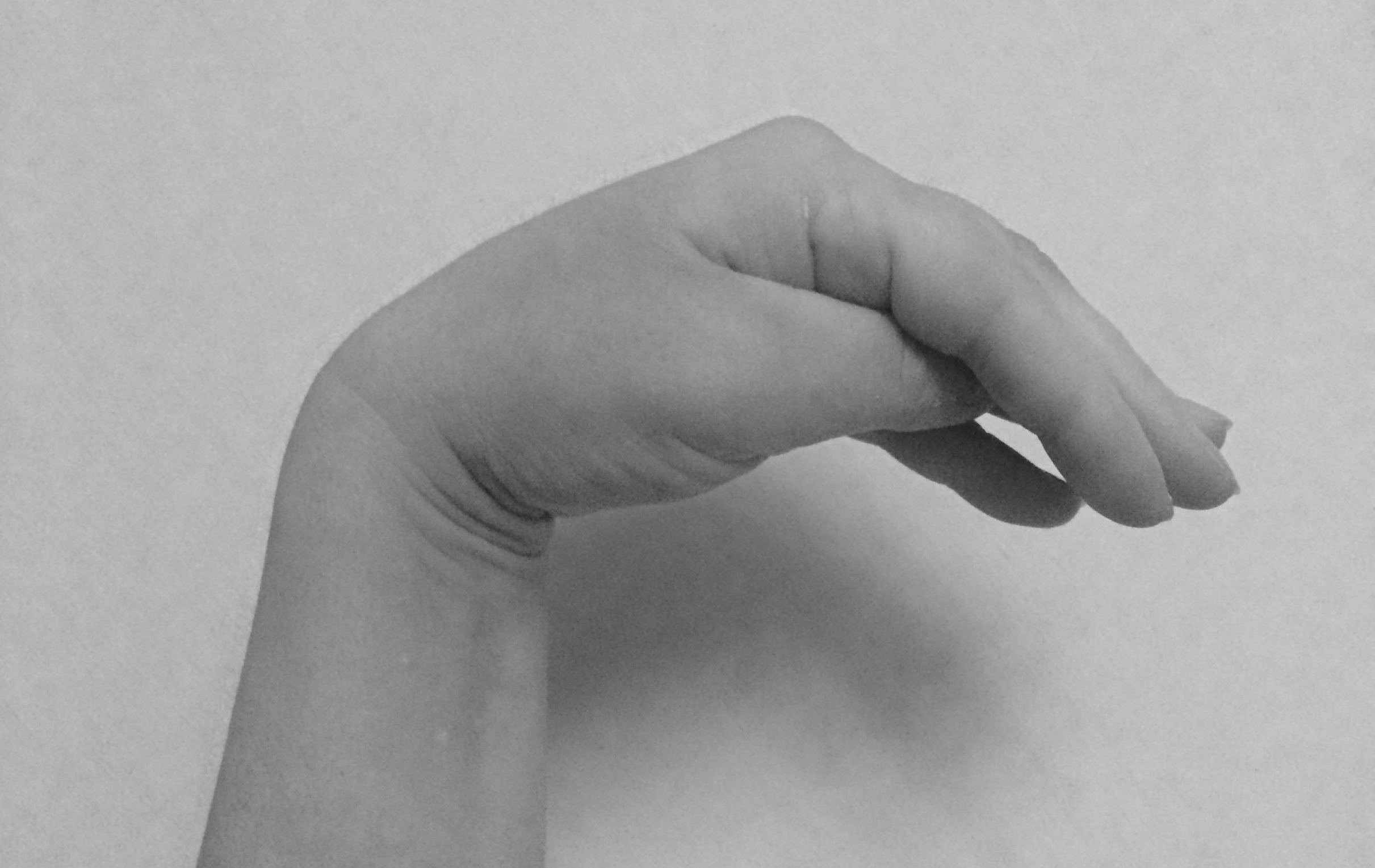 "рука акушера"